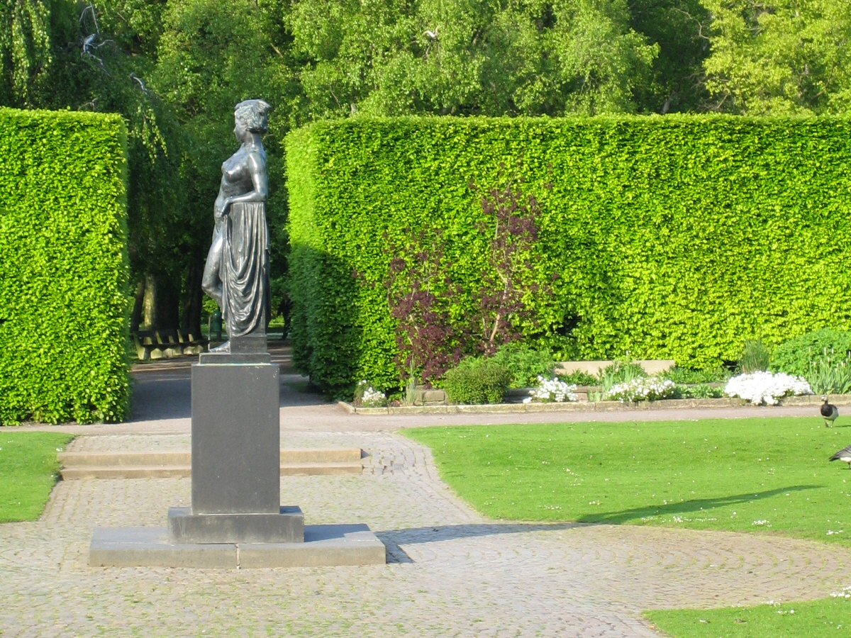 Statyn av Galathea i Pildammsparken, Malmö. Tagen av mig själv 25 maj 2005.